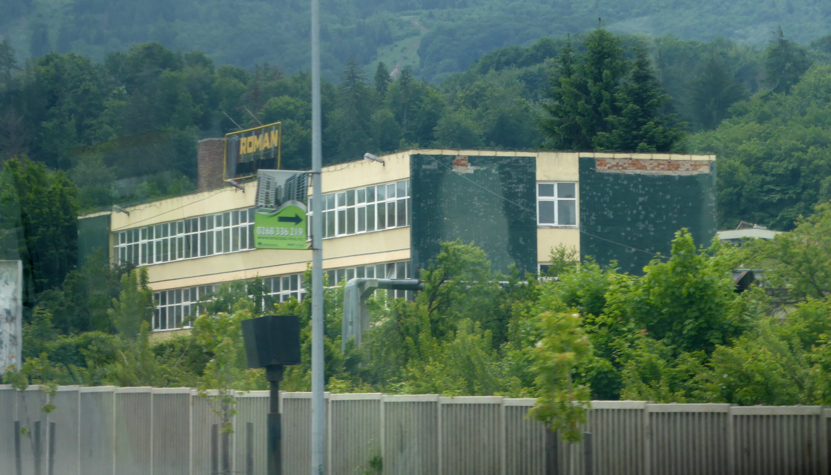 Gebäude des Nutzfahrzeugeherstellers Autocamioane Brașov (Roman).